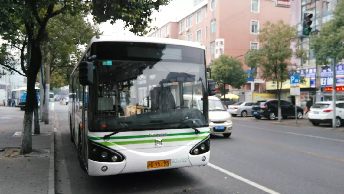 上海公交936路，2015年3月15日